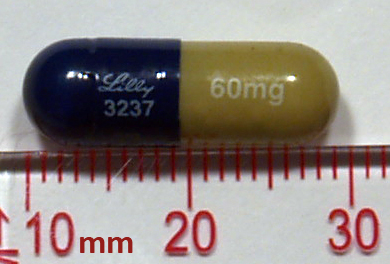 Cymbalta 60mg Eli & Lilly